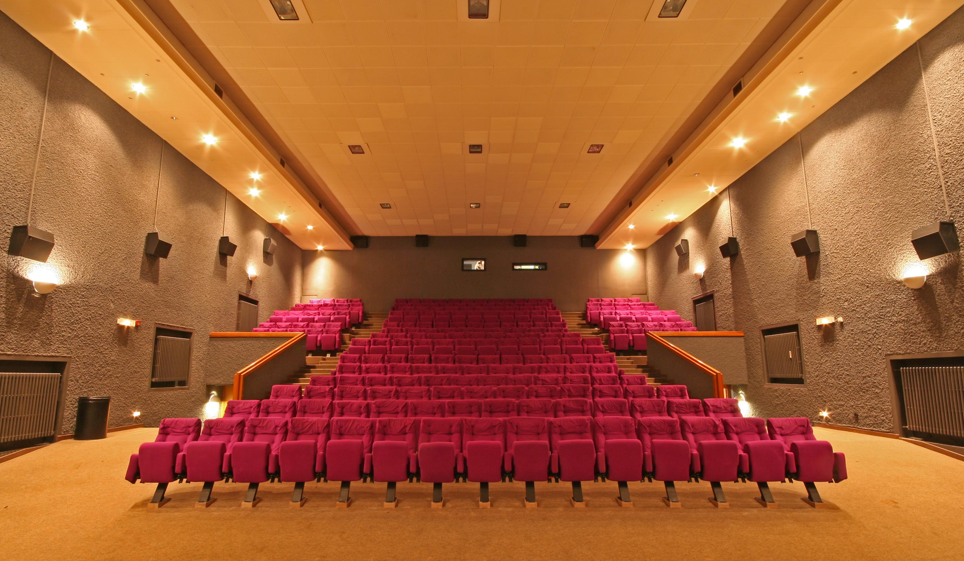 Den Ariston am neie "Look". Kategorie:Esch-Uelzecht Kategorie:Lëtzebuerger Kinoen